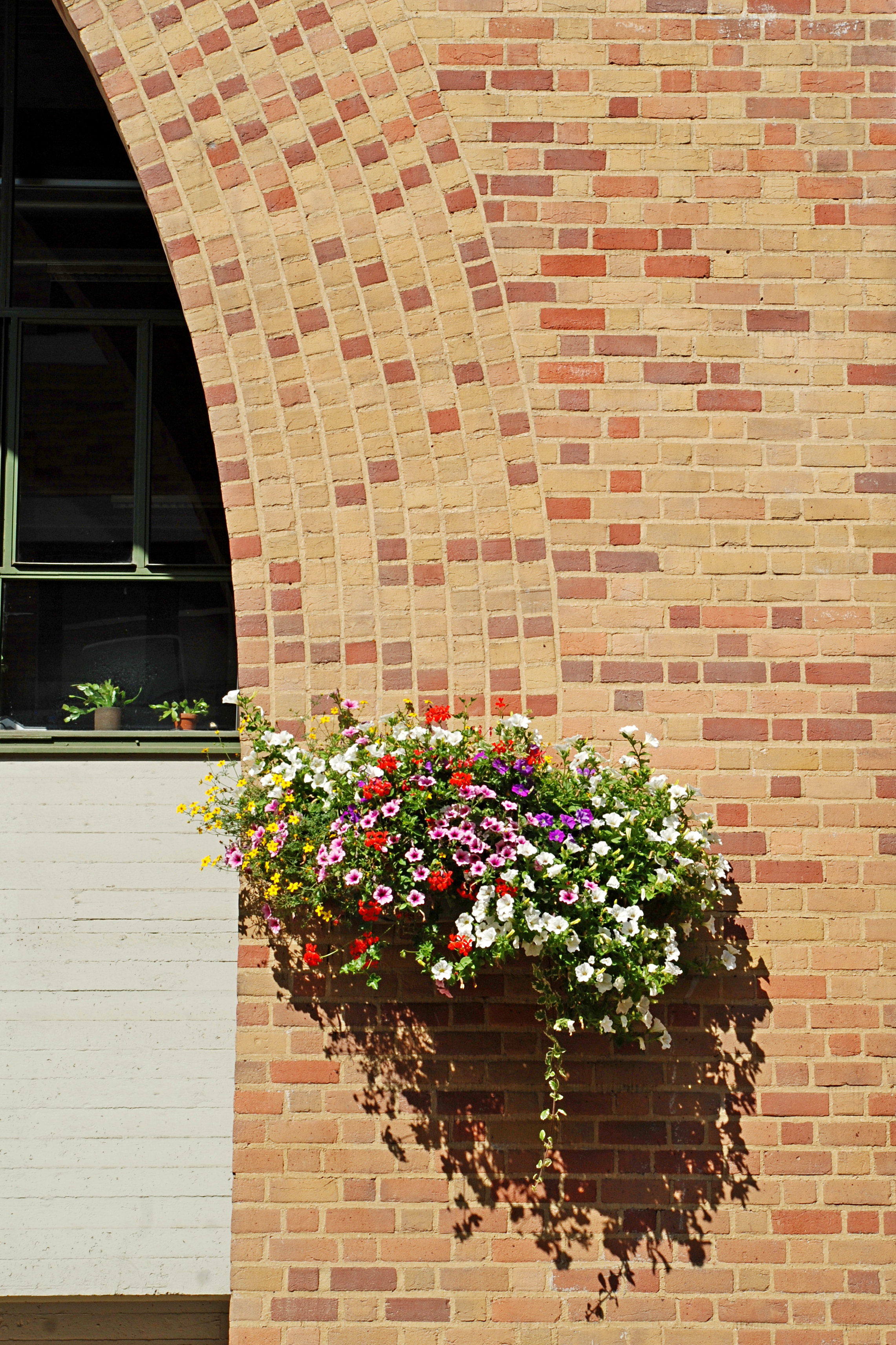 Belgique - Brabant wallon - Louvain-la-Neuve - Place de l'Université - Halles universitaires (architecture brutaliste, Yves Lepère et Joseph Polet, 1975-1976) This photo of immovable heritage has been taken in the Walloon Region